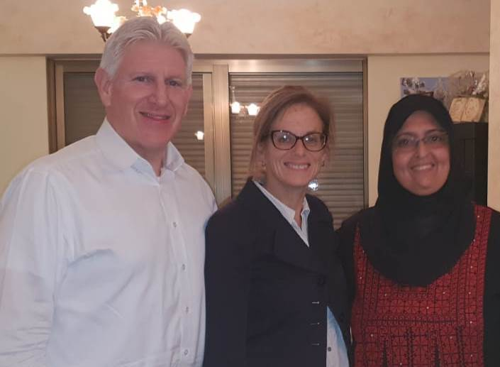 איבתיסאם מחאמיד יחד עם לורי ורוברט וקסלר